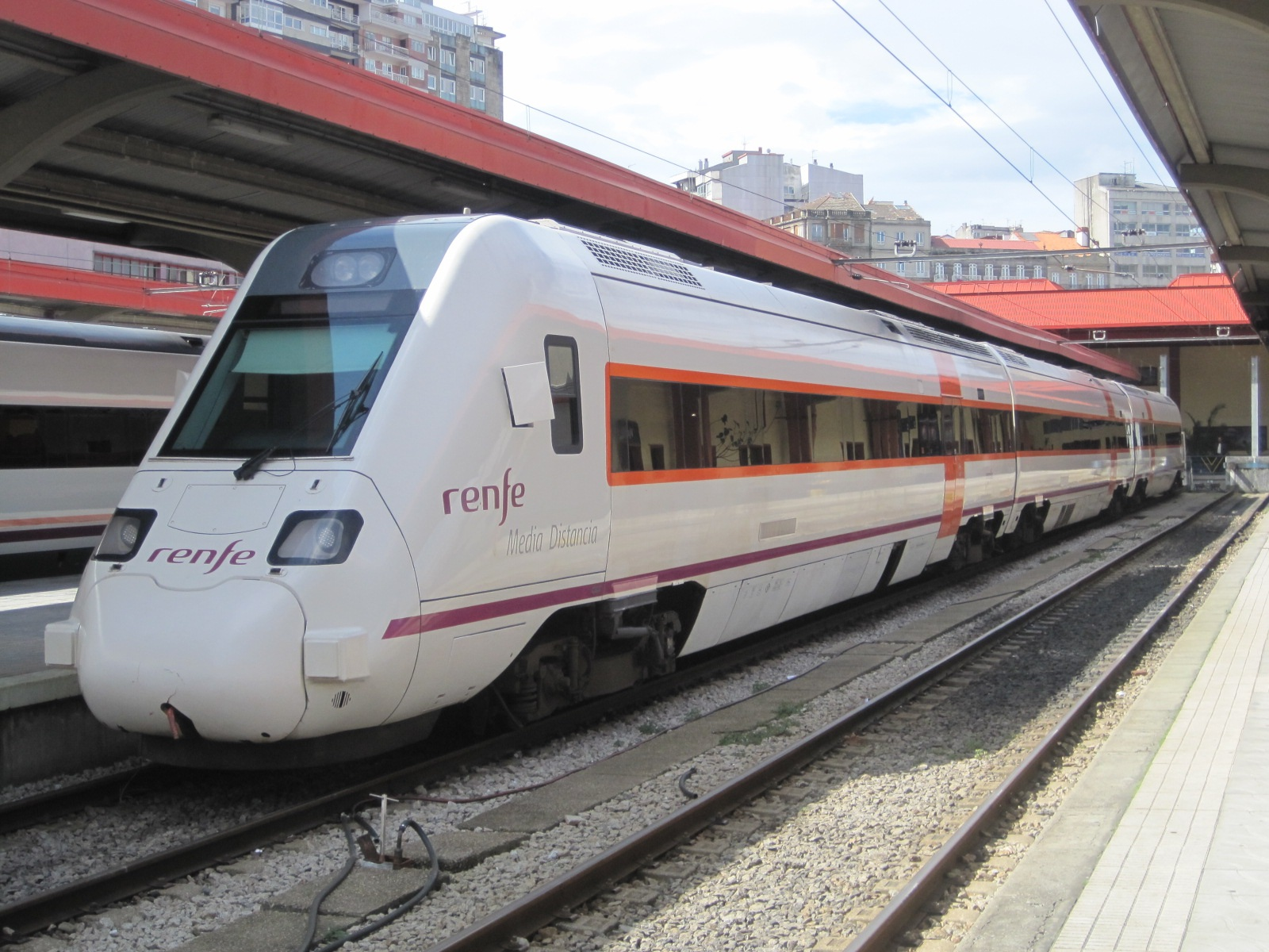 Regional 598 Vigo-Coruña